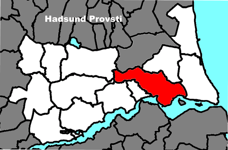 Sognets beliggenhed i Hadsund Provsti.